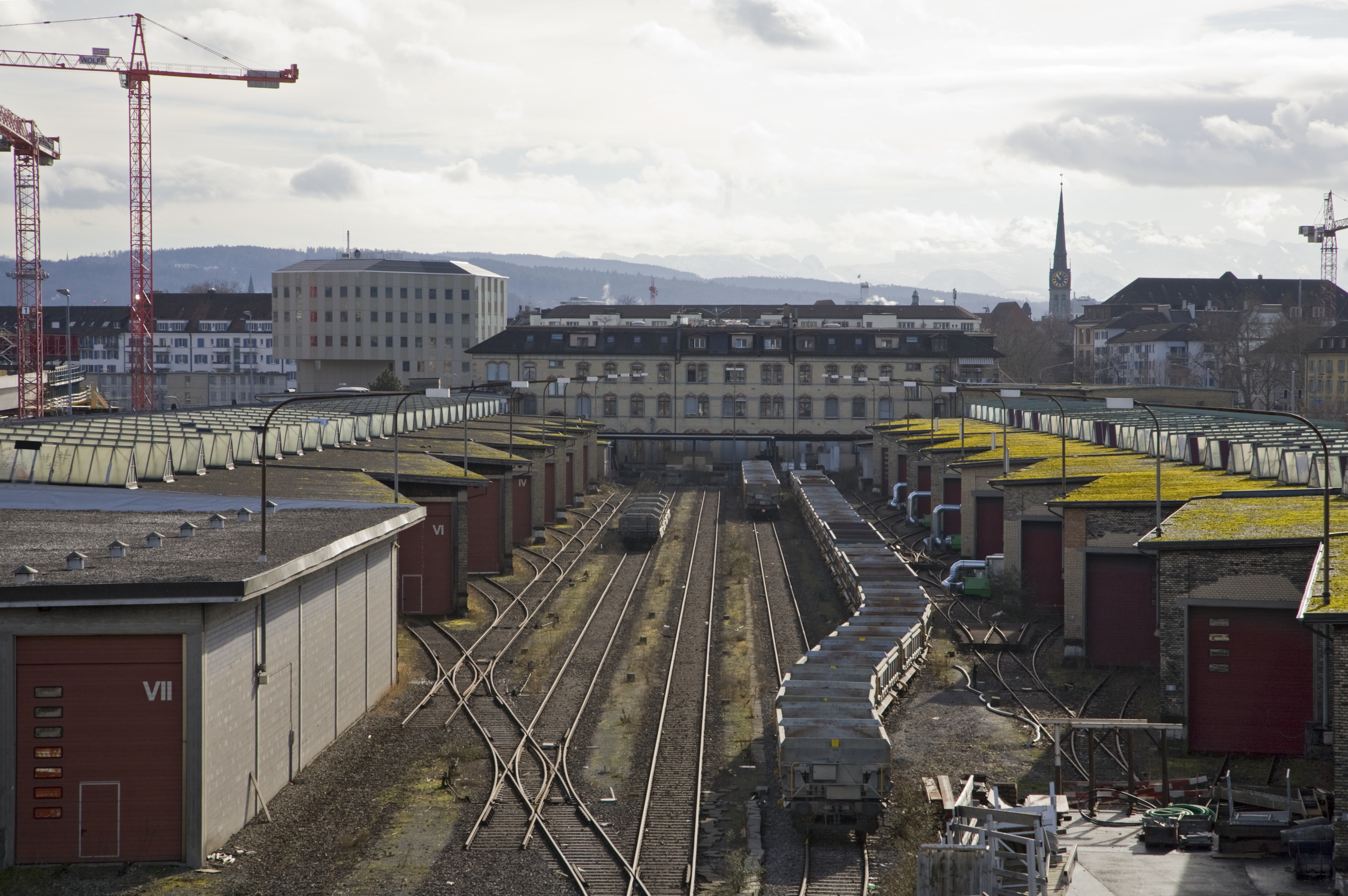 ehemaliger Güterbahnhof Zürich, Schweiz